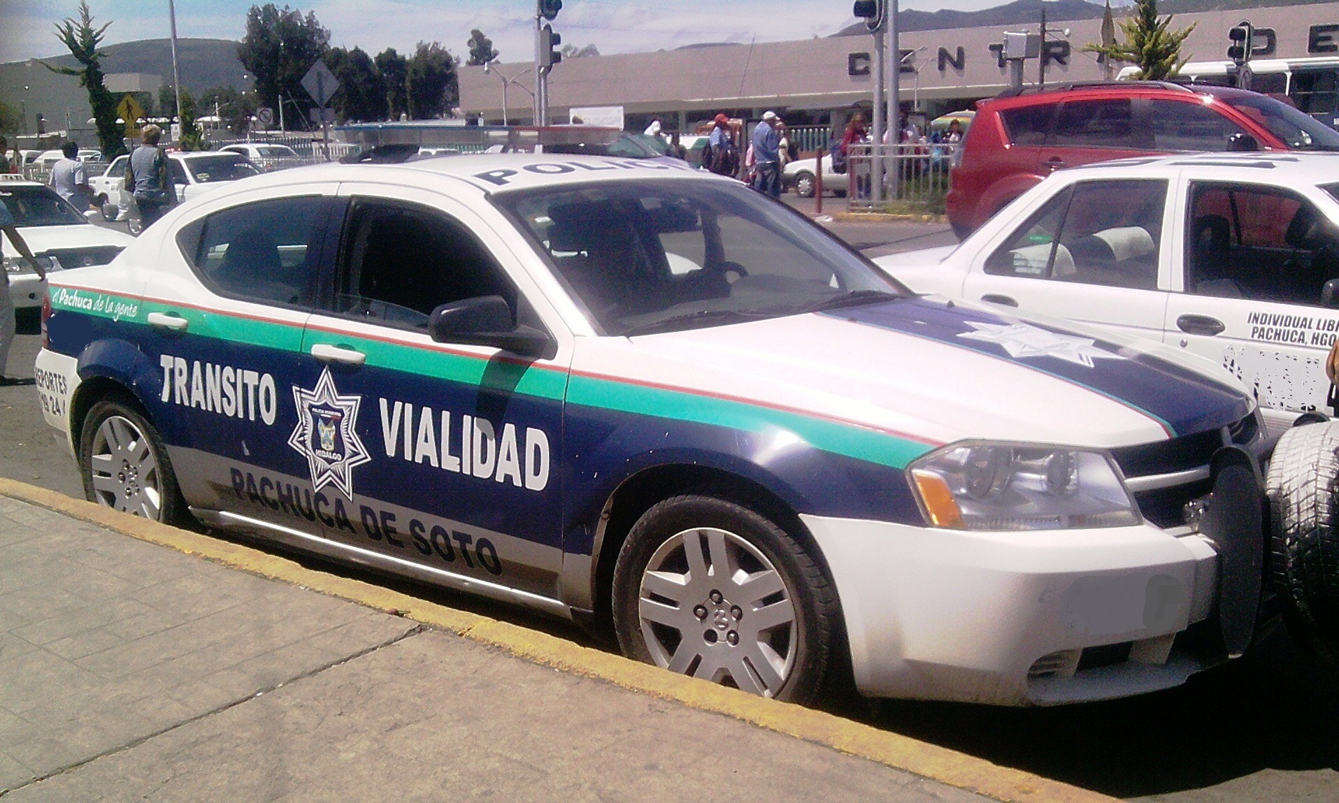 Patrulla de transito vehcular en pachuca